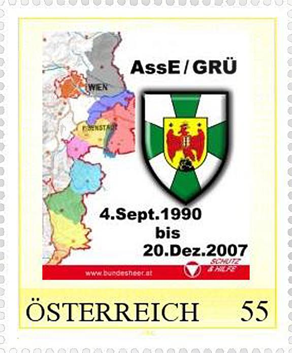 Sonderbriefmarke Beendigung des Assistenzeinsatzes